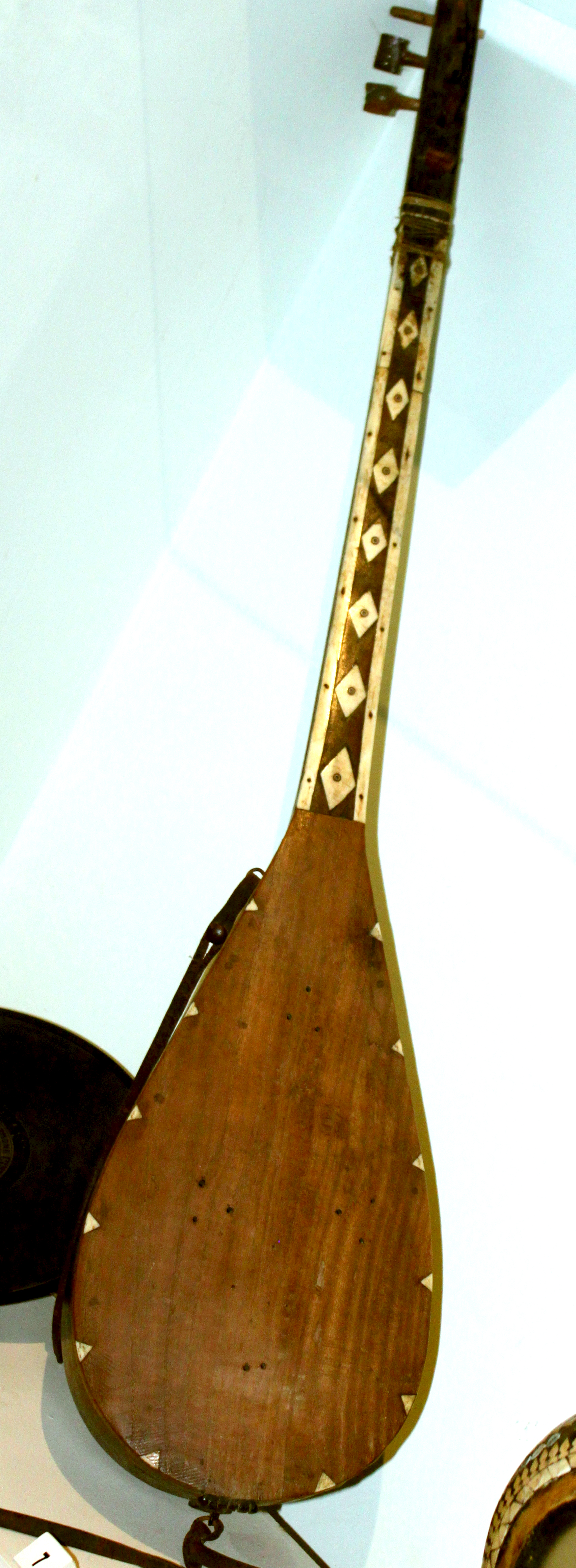 Aşıq Hüsyn Bozalqanlıya aid saz